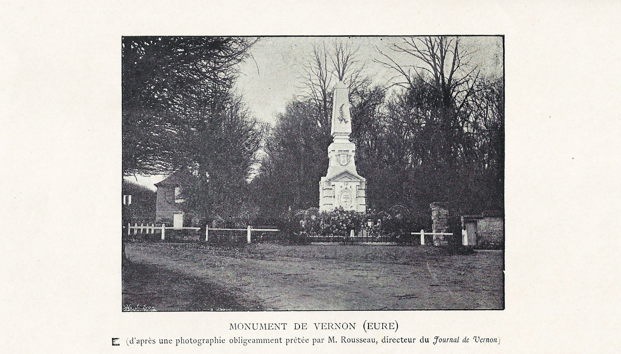 Scan d'une photo de 1901: Monument aux mobiles de l'Ardèche à Vernon (Eure)